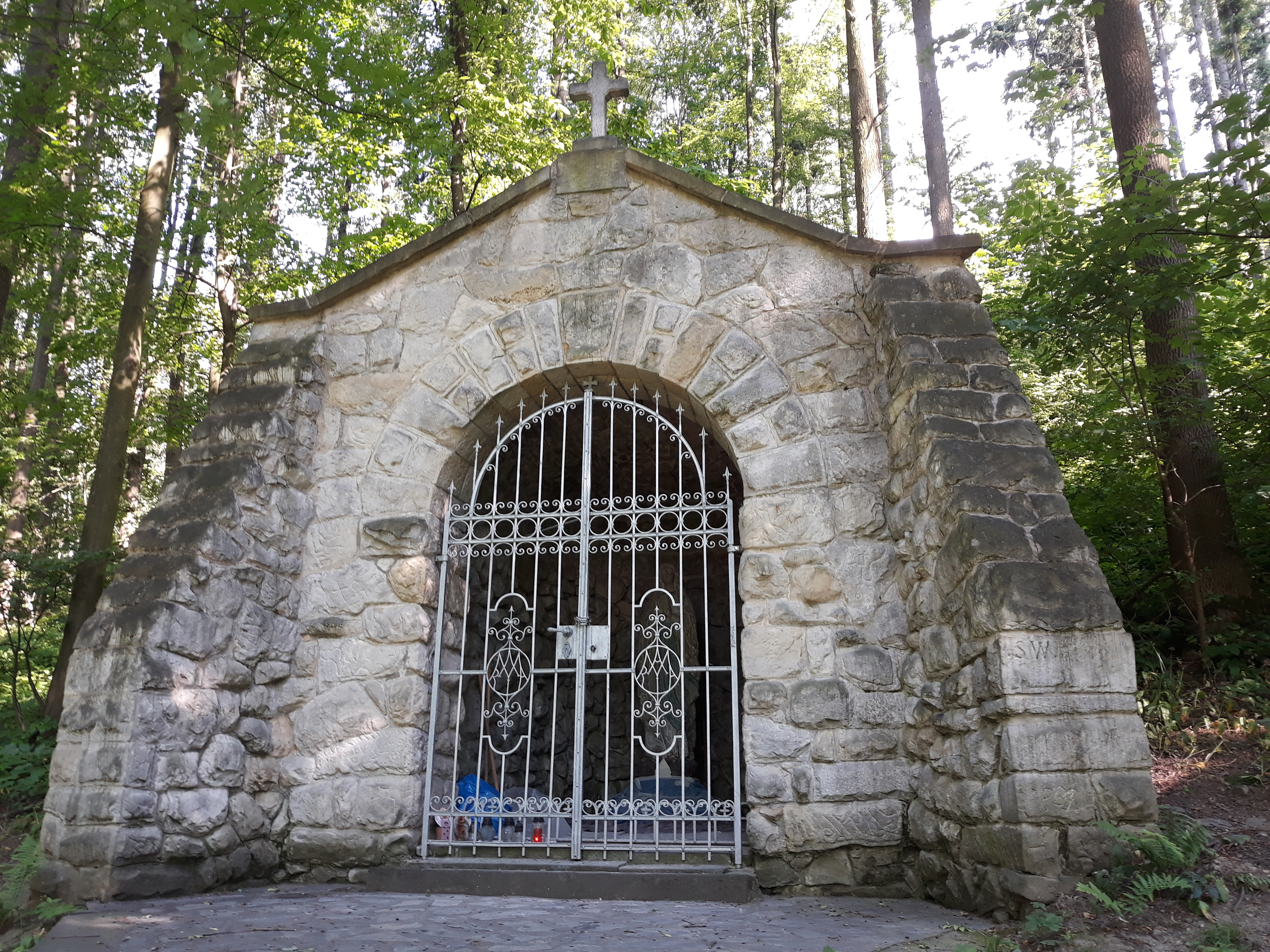 Jeskyně se sochou Panny Marie Lurdské (nachází se asi 100 m od studánky ve svahu)